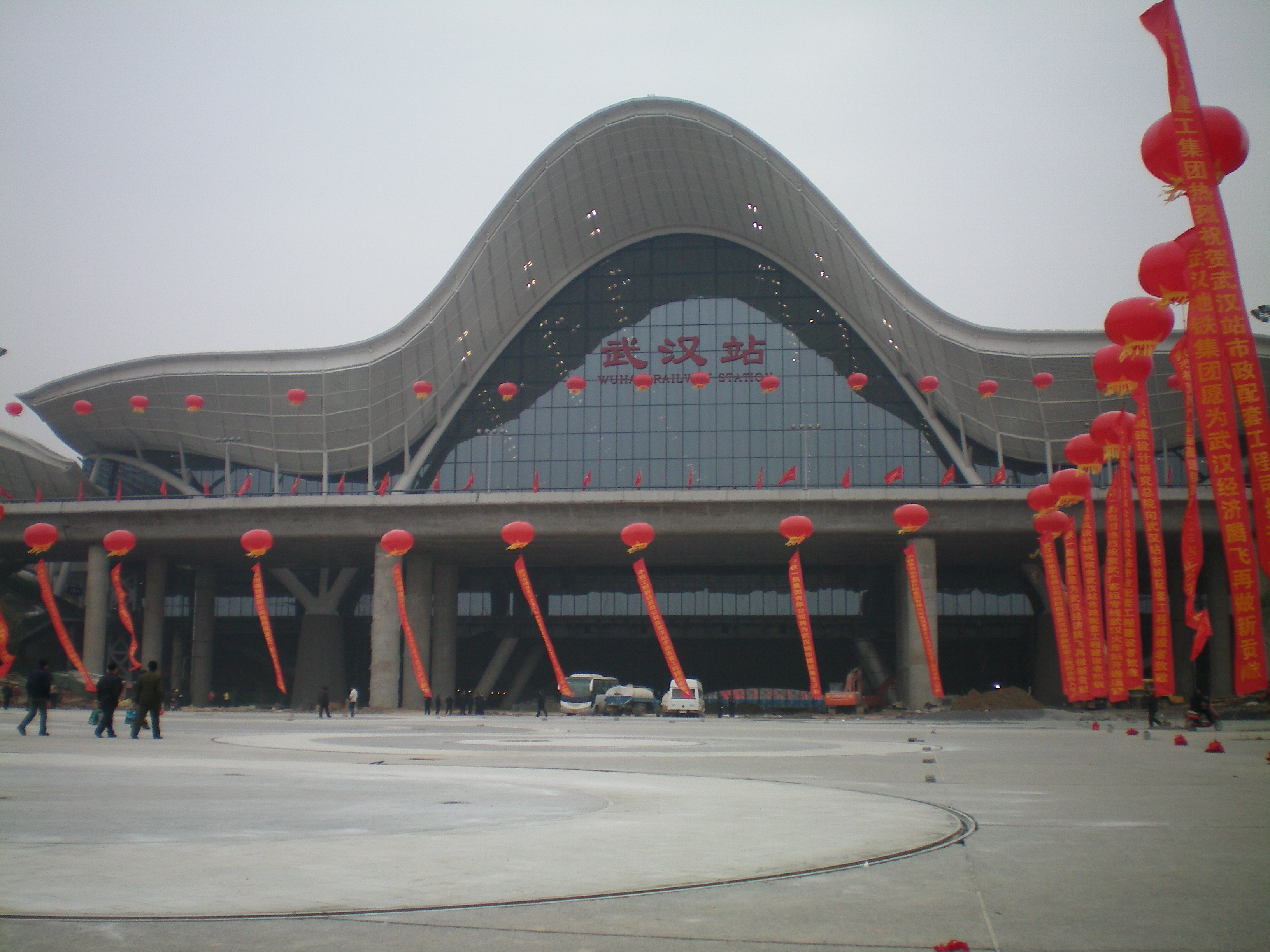 武汉火车站西进站厅